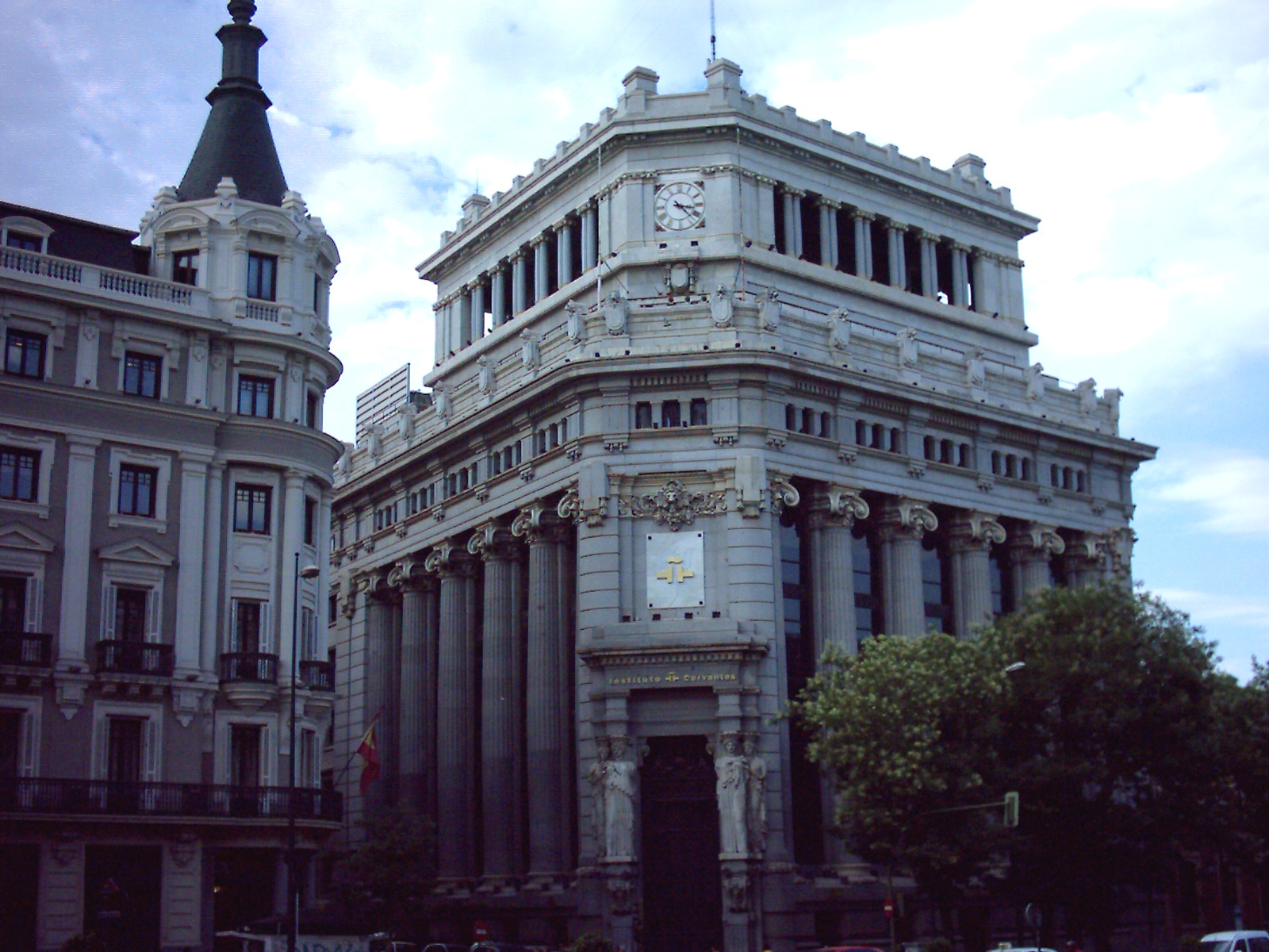 Madrid: Antiguo Banco del Río de la Plata, del arquitecto Antonio Palacios. Hoy Instituto Cervantes. Madrid: Former Bank of Rio de la Plata. Architect: Antonio Palacios.